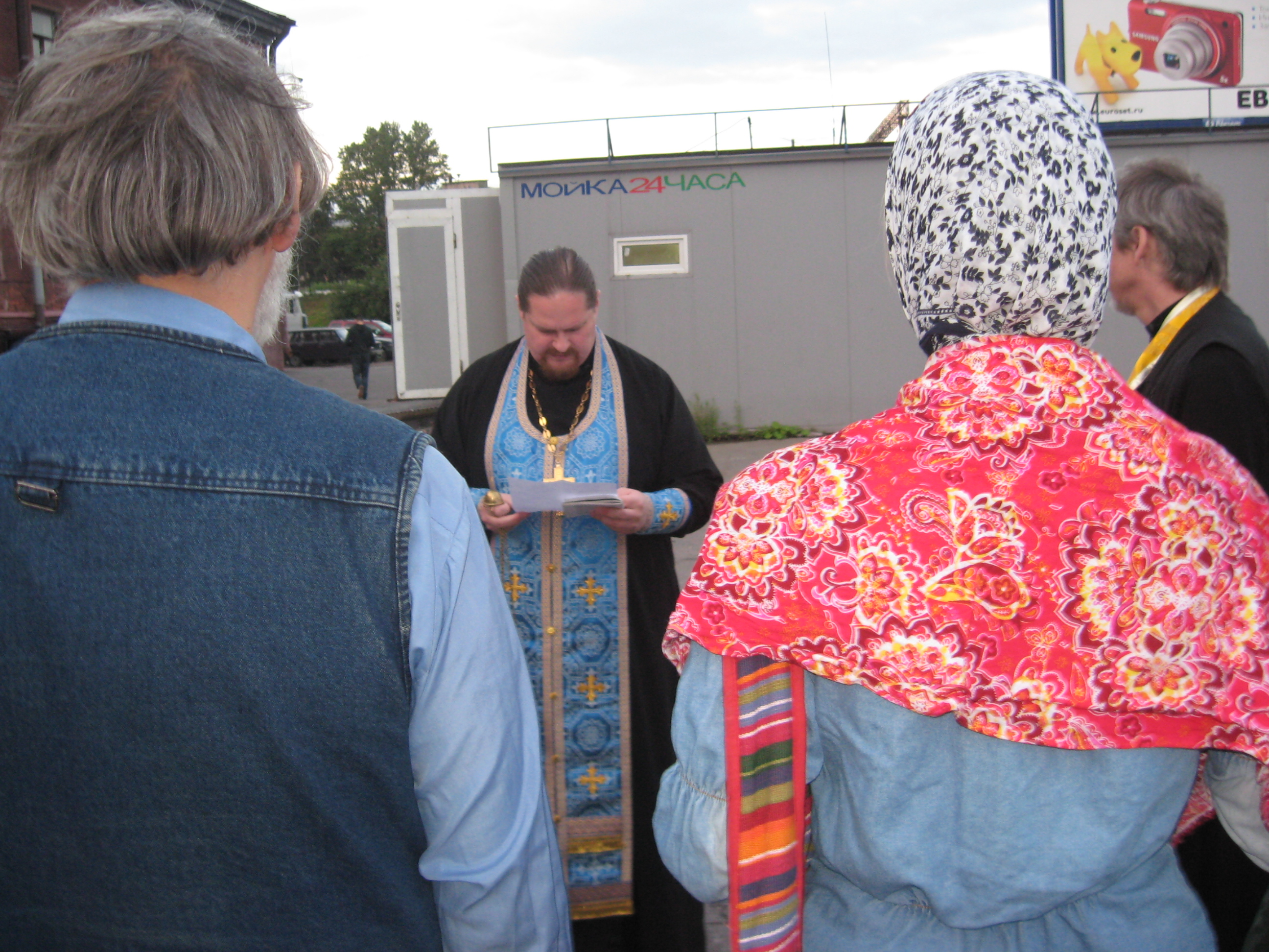 Служба на месте Мирониевского храма в день памяти св. великомученика Мирония